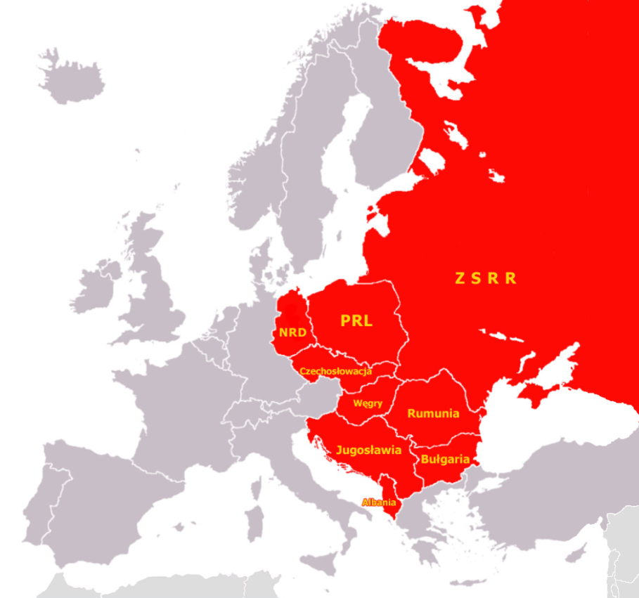 Kraje socjalistyczne w Europie